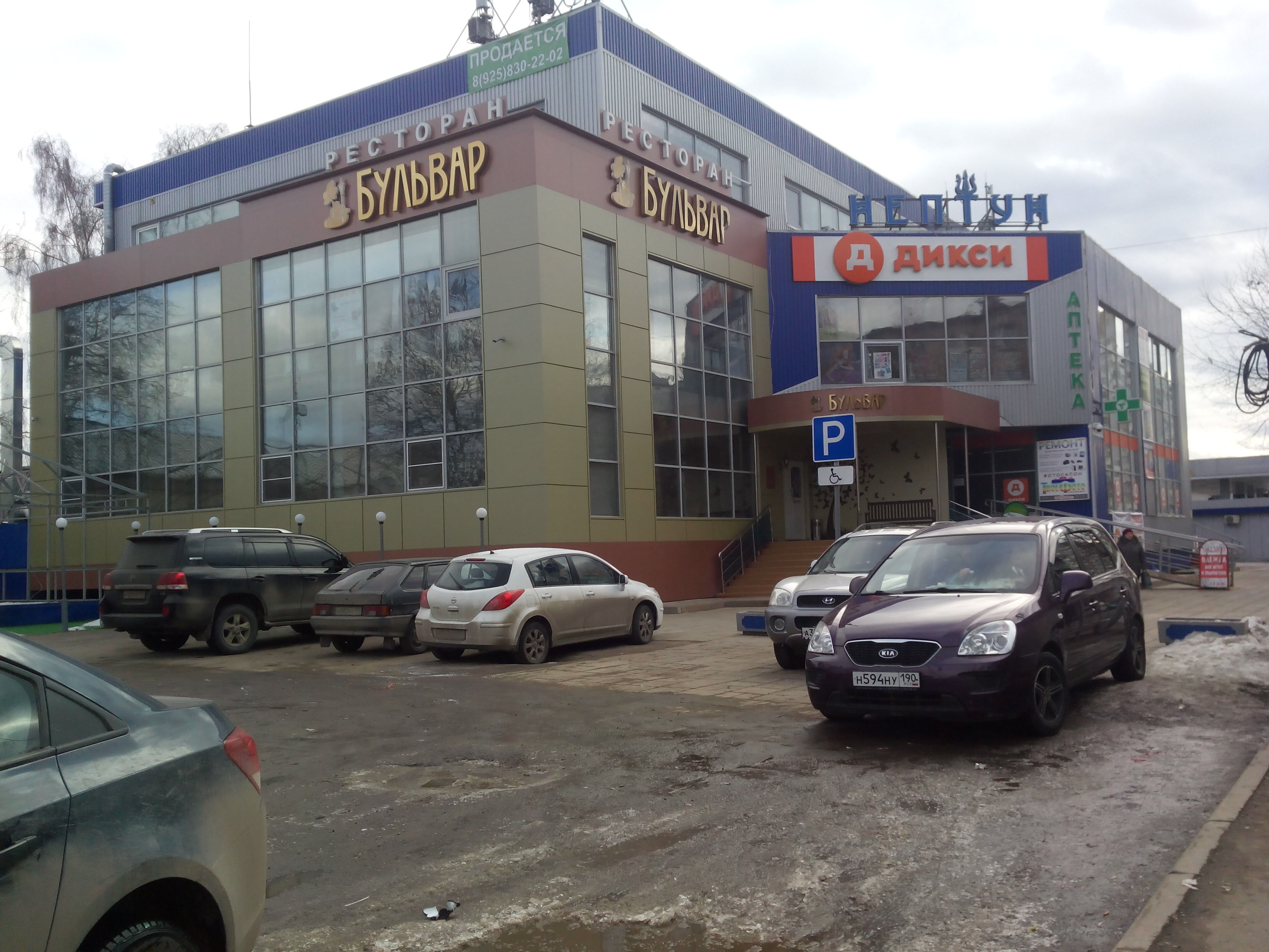 Торговый центр «Нептун», г. Королёв, ул. Орджоникидзе, 5в